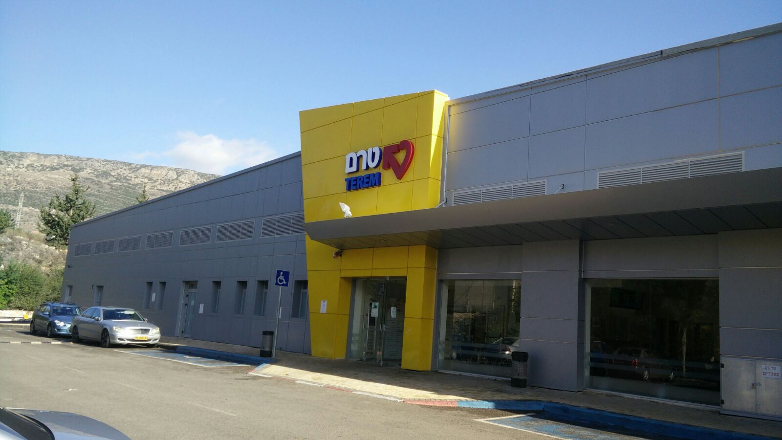 מרפאת טרם בכרמיאל